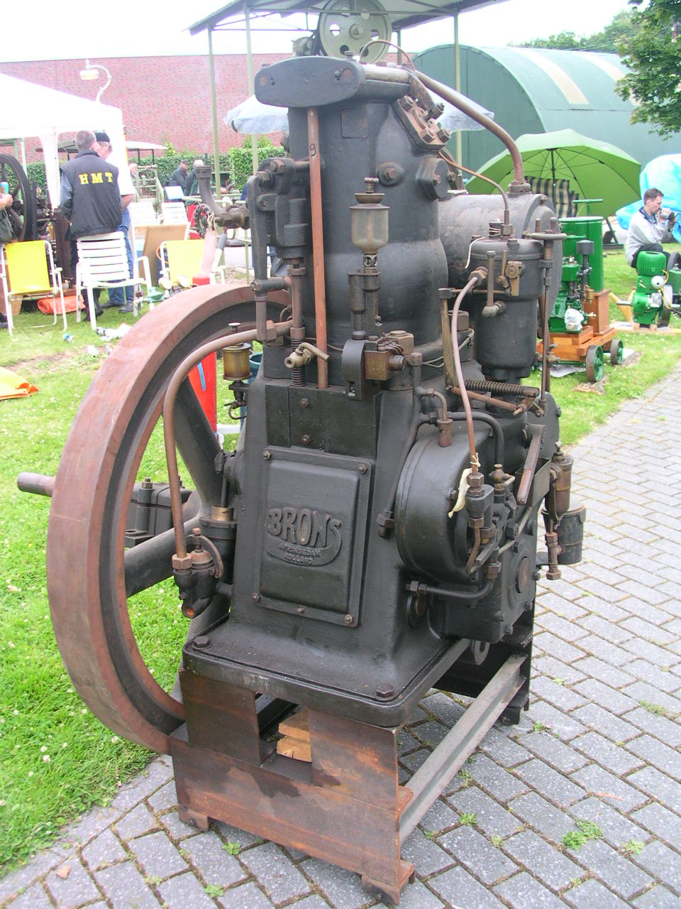 Kerkrade, Industrion, Maschinenfest 2004. Motor von Brons, Appingedam